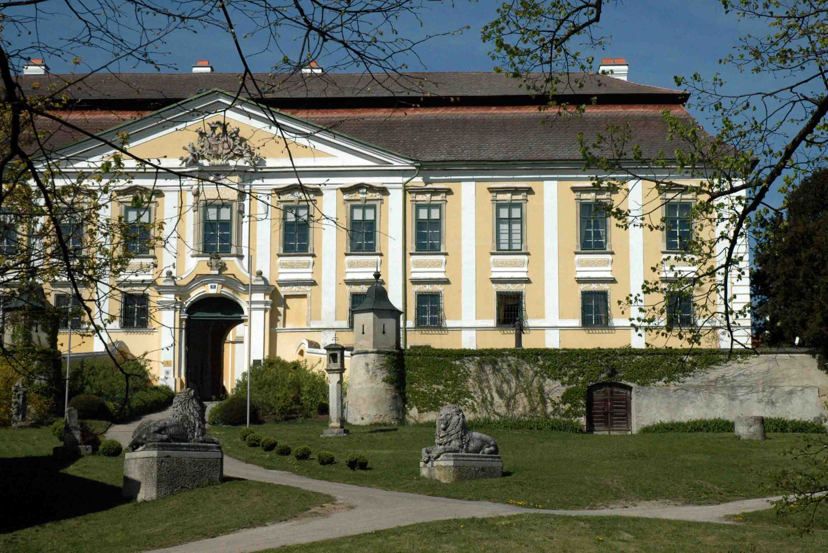 Schloss Gobelsburg, Austria: Eingang zum Schloss und Weingut. Hauptfassade und übergiebeltes Portal von Schloss Gobelsburg (Südtrakt). Das Schloss ist auch Sitz des gleichnamigen Weingutes. Die darunter liegenden Weinkeller gehen auf das 11. Jahrhundert zurück. Dort reifen auch heute noch die Weine des Guts. own work, 04-21-2007 Author: Verita